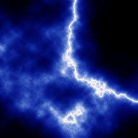 Rayo en primer plano